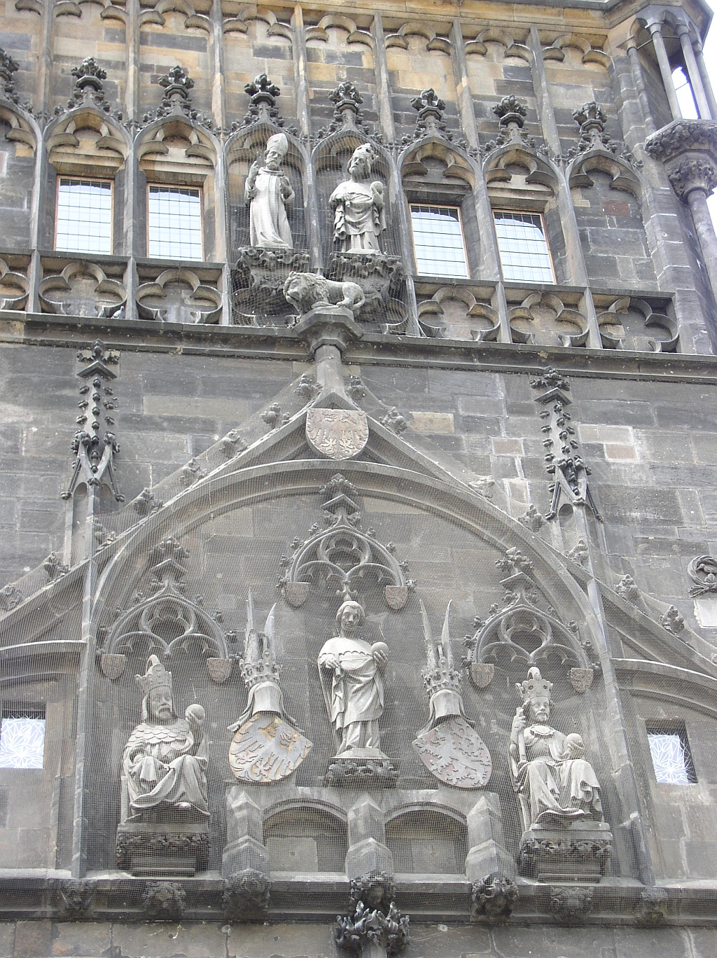 Detail části výzdoby Staroměstské mostecké věže v Praze